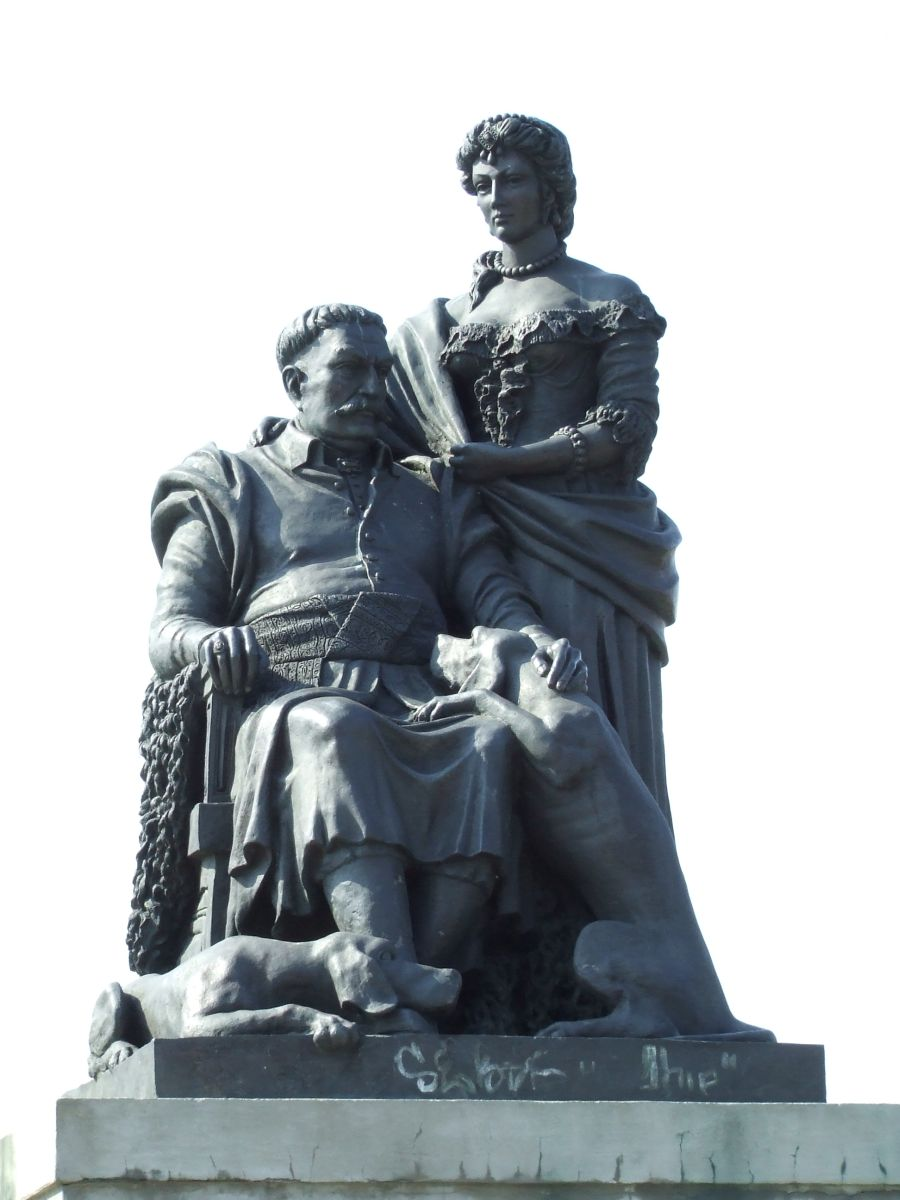 Pomnik Sobieskiego w Wilanowie